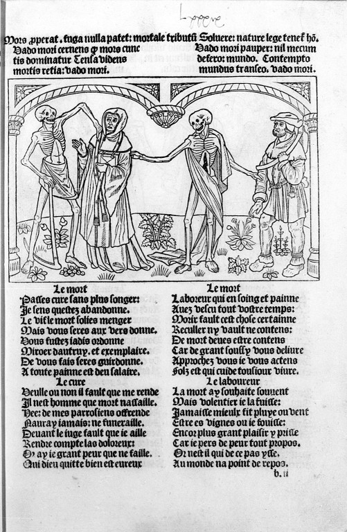 La Danse macabre. Paris, Guy Marchant, 1486 : Un curé et un laboureur. Illustration numérisée d'après le microfilm R 1760, Paris, BnF (Réserve des Livres rares et précieux), cote : Res Ye 189/Microfilm R 1760